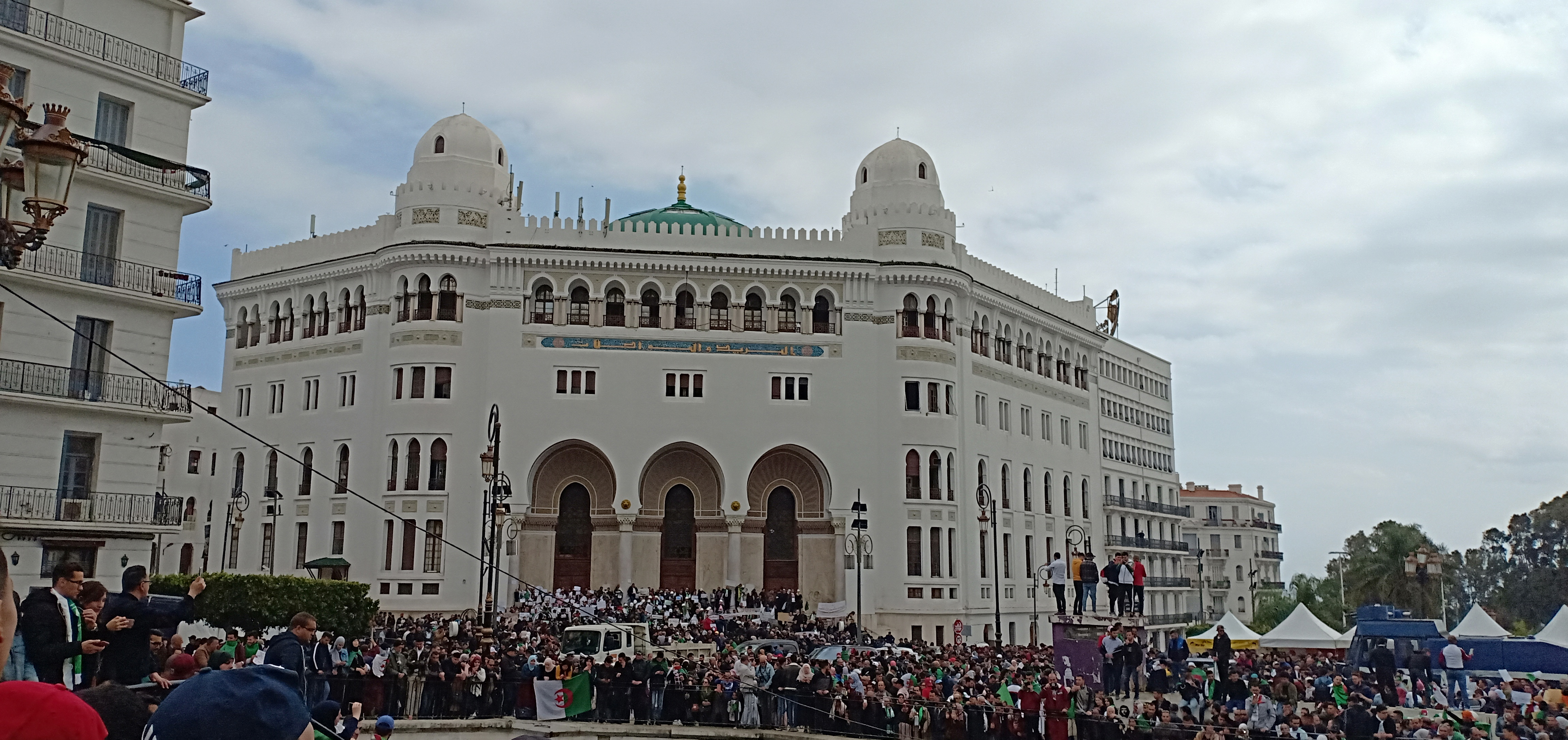 Alger centre: dans le centre de la capitale de l'Algérie ce trouve la plus ancienne poste "la grande poste" construite dans un style néo-mauresque, dans cette photo les rues d'Alger sont inondées de gens ce qui rend le paysage encore plus attractif.